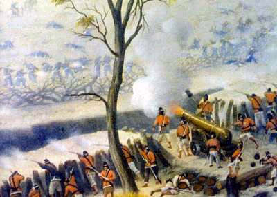 Battle of Curupaity, 24. september 1866. Pt: Soldados paraguaios em Curupaiti atirando de uma trincheira contra as tropas aliadas.